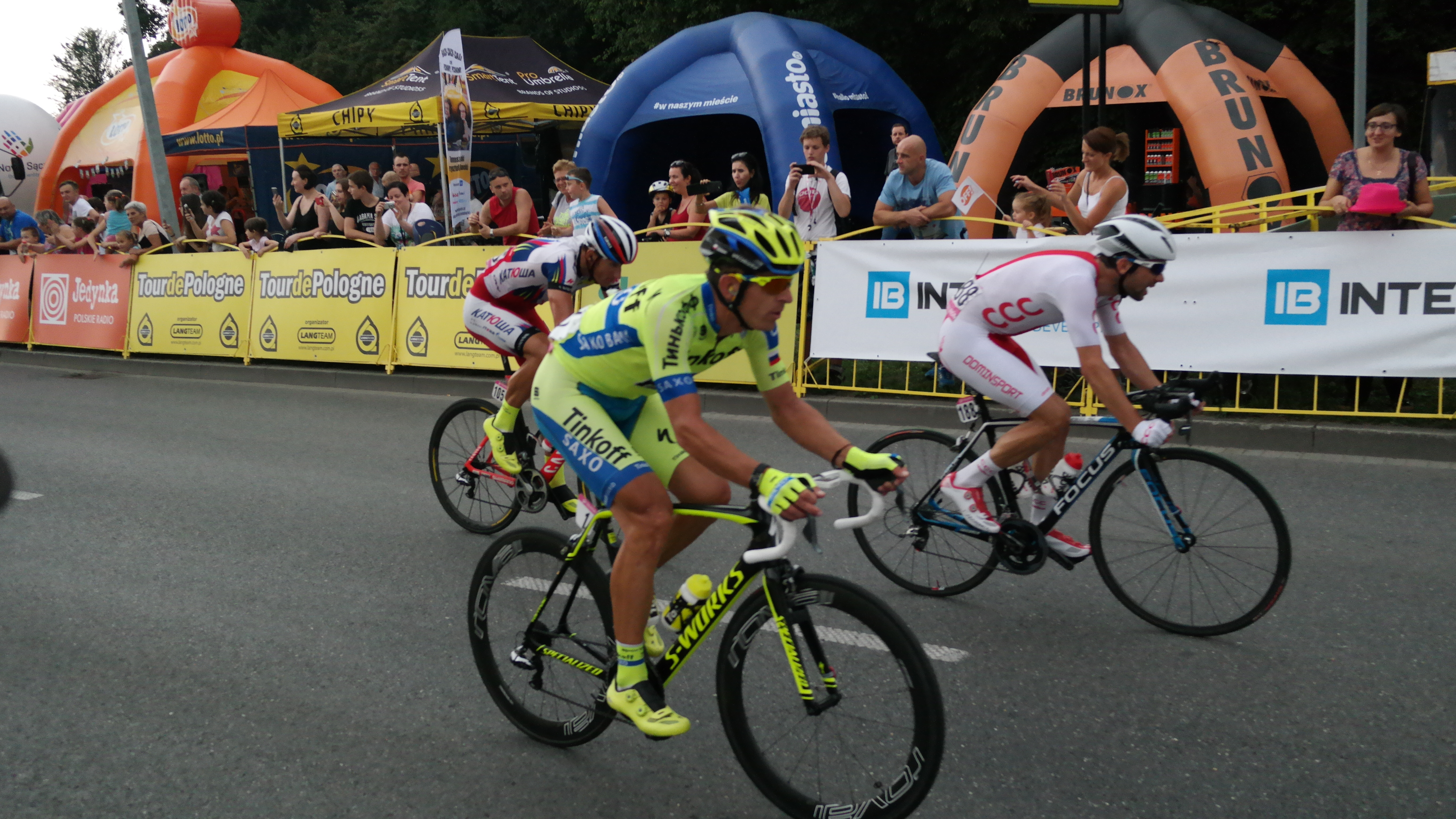 1. M. Bodnar (TCS) 188. K. Zieliński (POL) 105. G. Smukulis